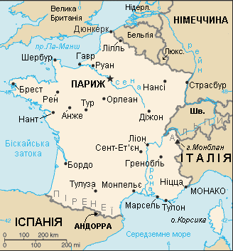 Frantzia Mapa Ukr.PNG: Мапа Франції.